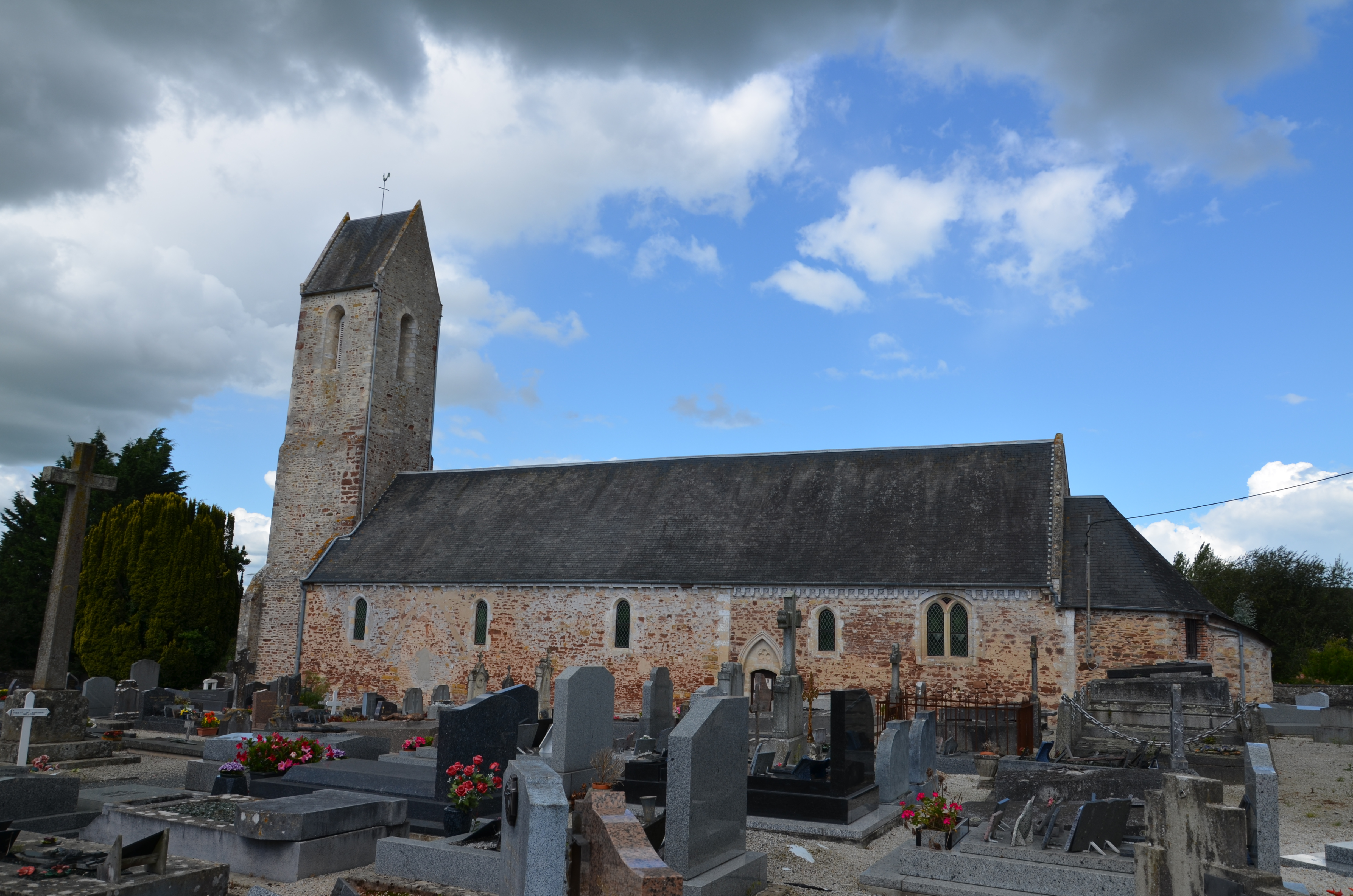 Église Saint-Pierre de Cartigny-l'Épinay.